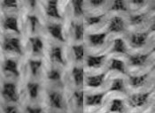 RL Gestrick rechts und links